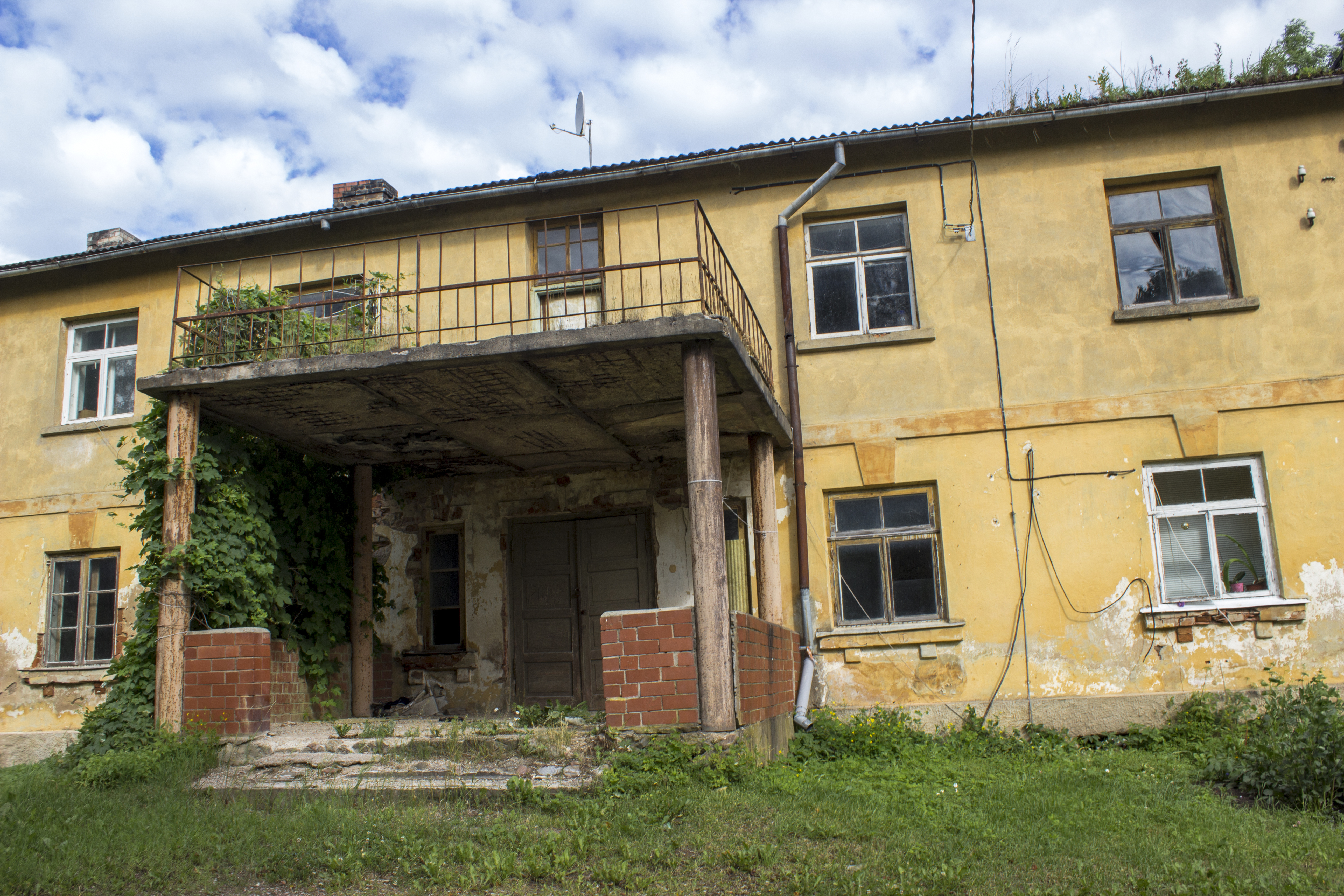 Snapju muiža / manor